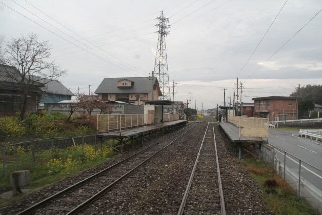 下伊田駅